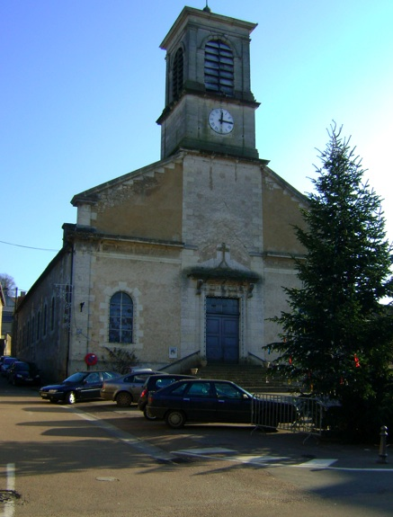 L'église de L'Isle-sur-Serein